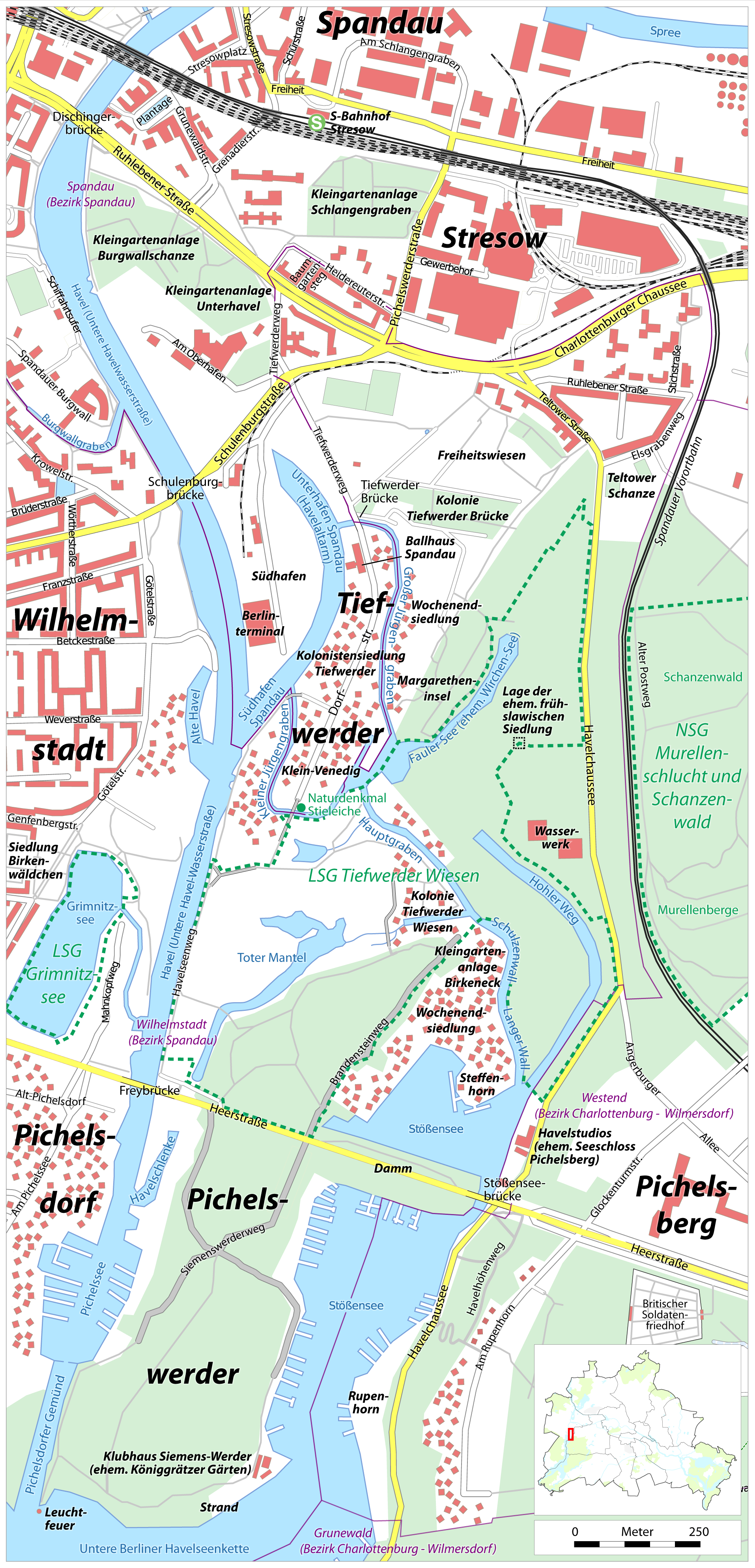 Karte von Tiefwerder in Berlin